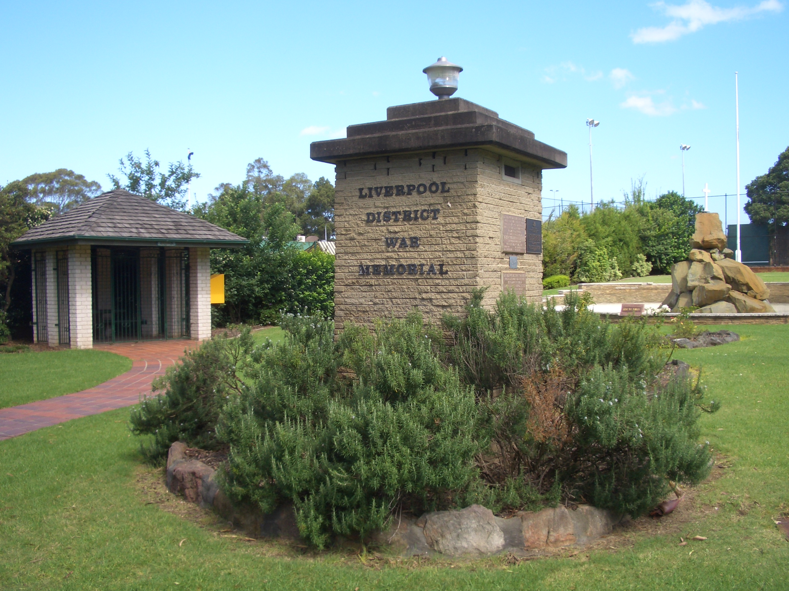 Bigge Park, Liverpool, Sydney